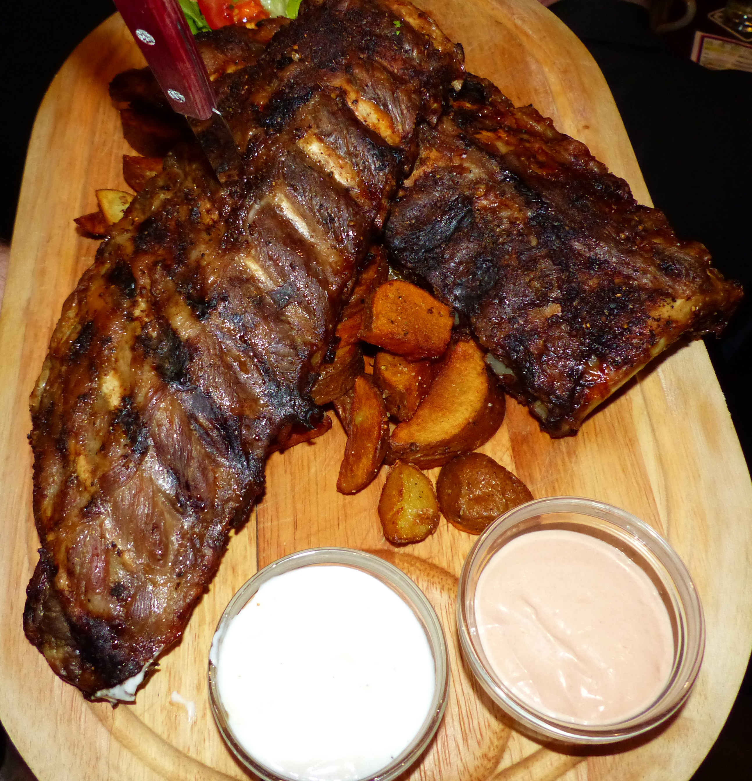 Rippchen im 9er Bräu in Wien